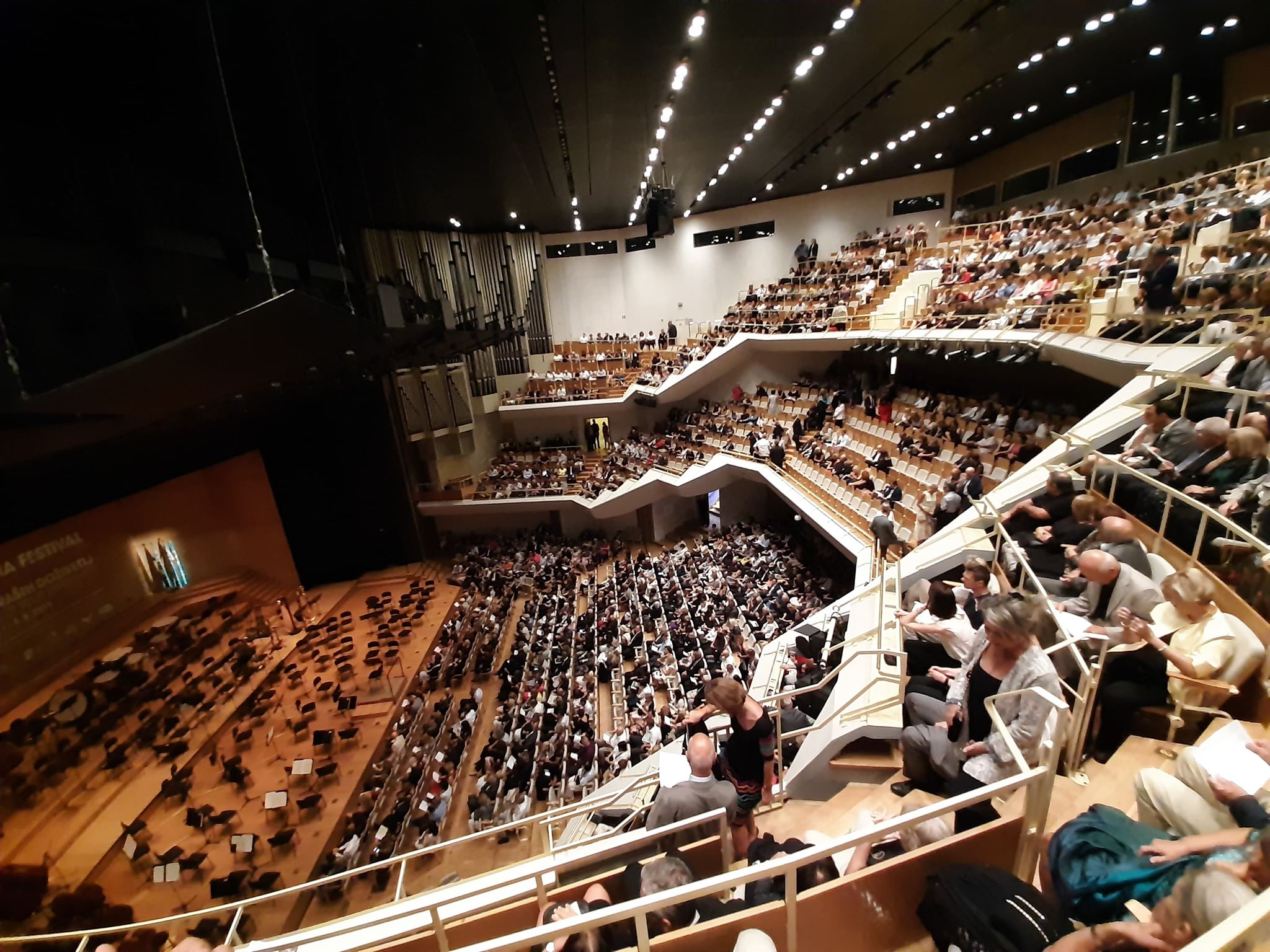 Cankarjev dom - Gallusova dvorana, Cankar Centre - Gallus Hall Zubin Mehta